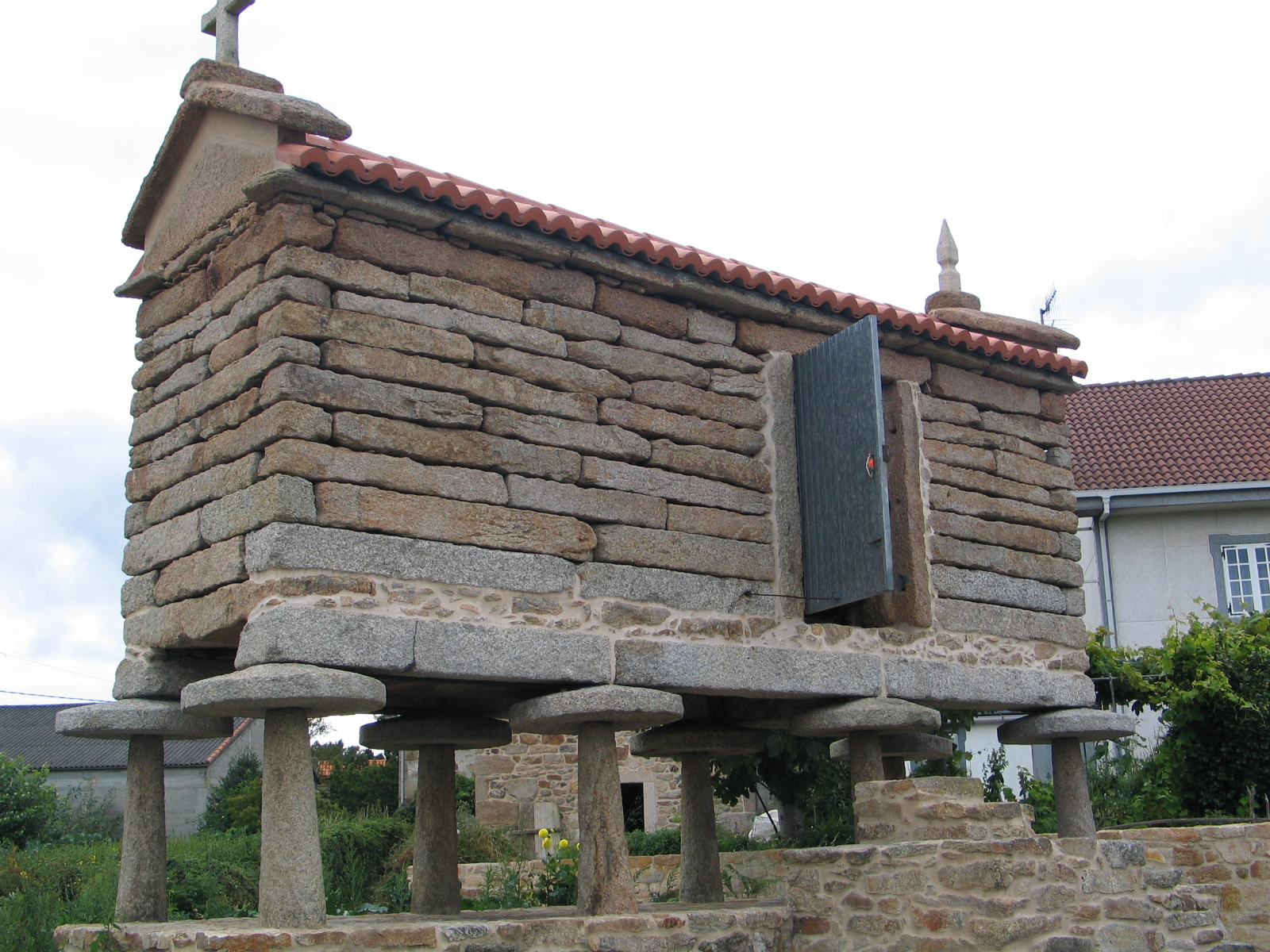 Hórreo